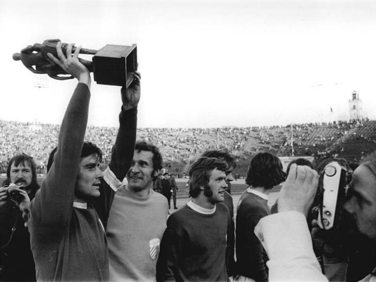 ADN-ZB-Mittelstädt-14.4.74-Gü-Leipzig: Endspiel um den FDGB-Pokal am 13.4.74 - SG Dynamo Dresden - FC Carl Zeiss Jena 1:3 - Der Jenaer Mannschaftskapitän Peter Ducke, den erkämpften Pokal in der Hand, und seine Elf wurden stürmisch gefeiert.